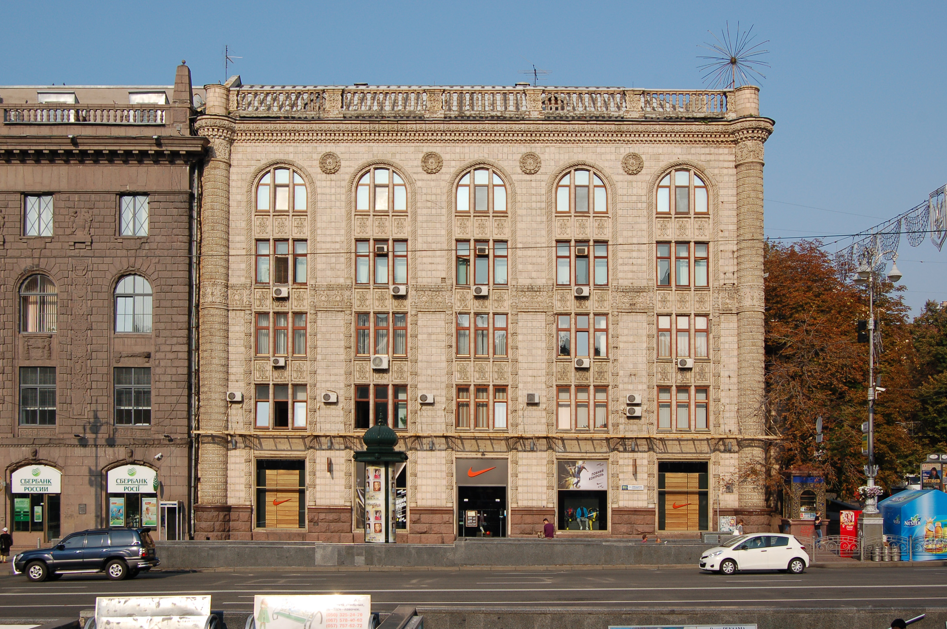 Дом № 30/1 по улице Крещатик в Киеве